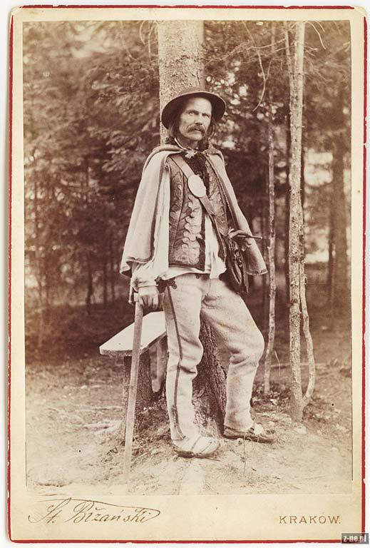 Maciej Sieczka - przewodnik tatrzański